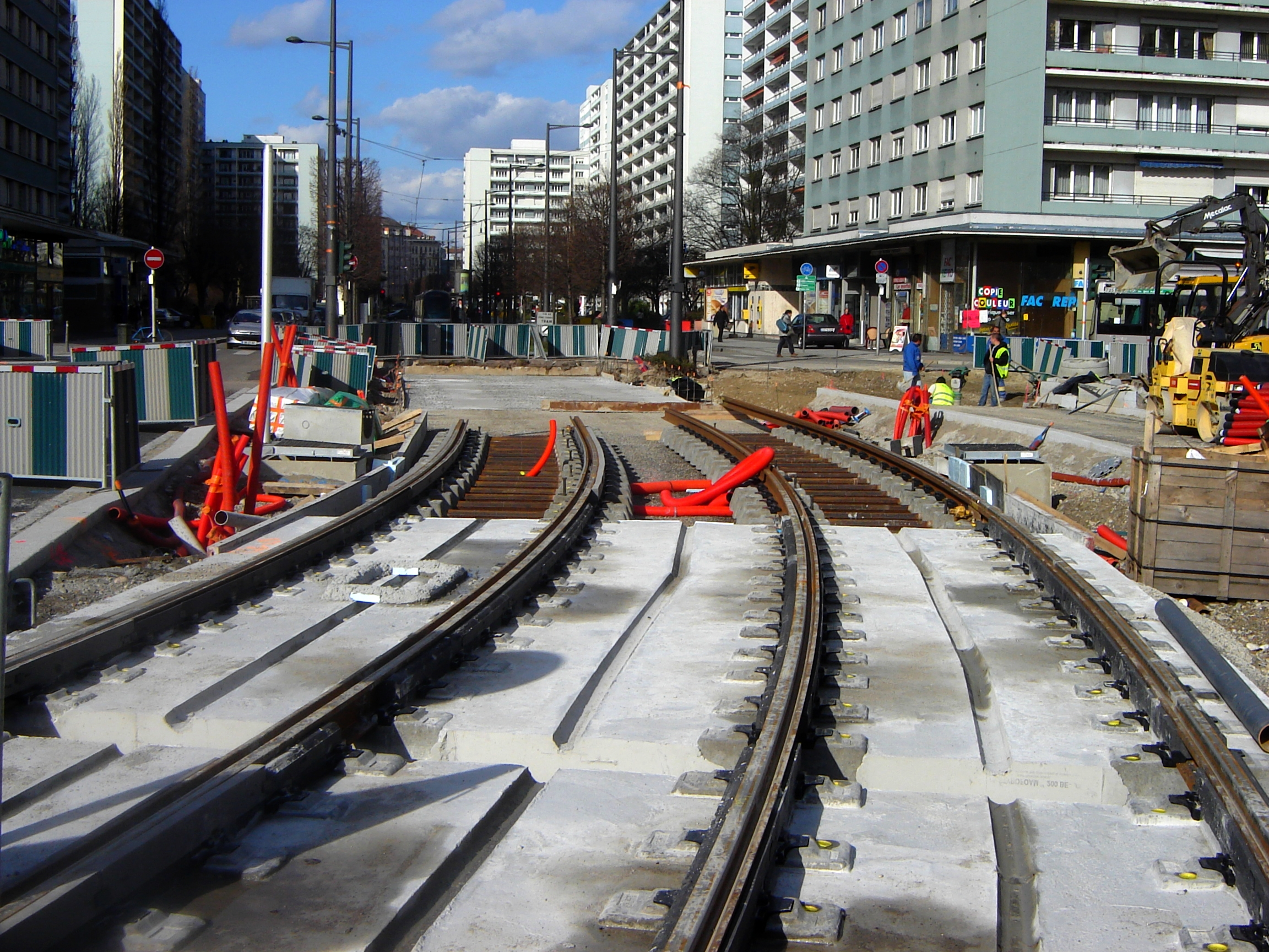 Chantier des extensions tram 2007 - 2008, en aout 2006